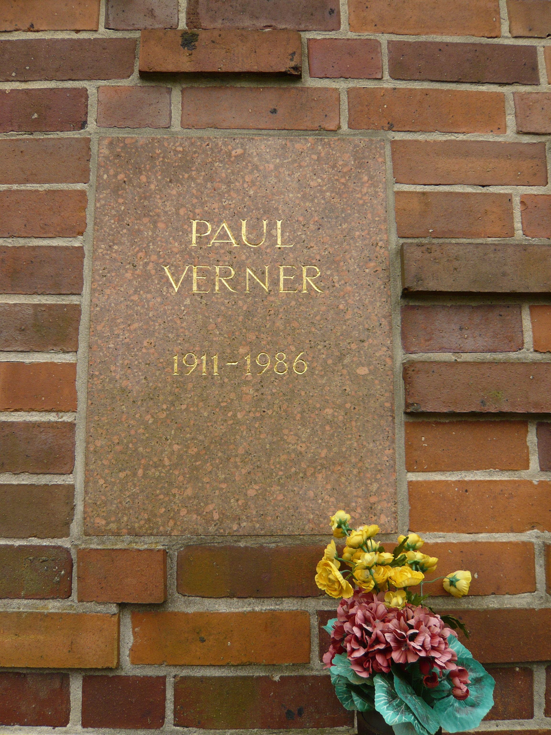 Grab auf dem Zentralfriedhof Friedrichsfelde